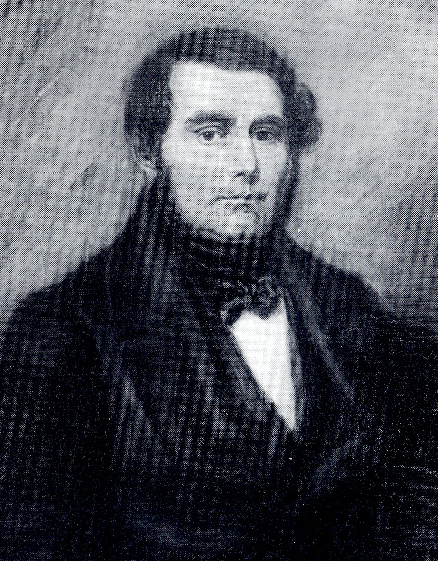 Der Heilbronner Papierfabrikant Gustav Schaeuffelen (1798–1848). Ölgemälde nach einer älteren Vorlage, Historisches Museum Heilbronn